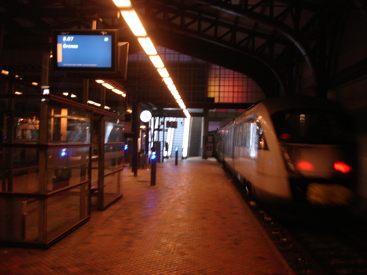 Nærbanens første plantog fortsætter til Grenaa fra Aarhus H d. 9. december 2012 kl. 8.07